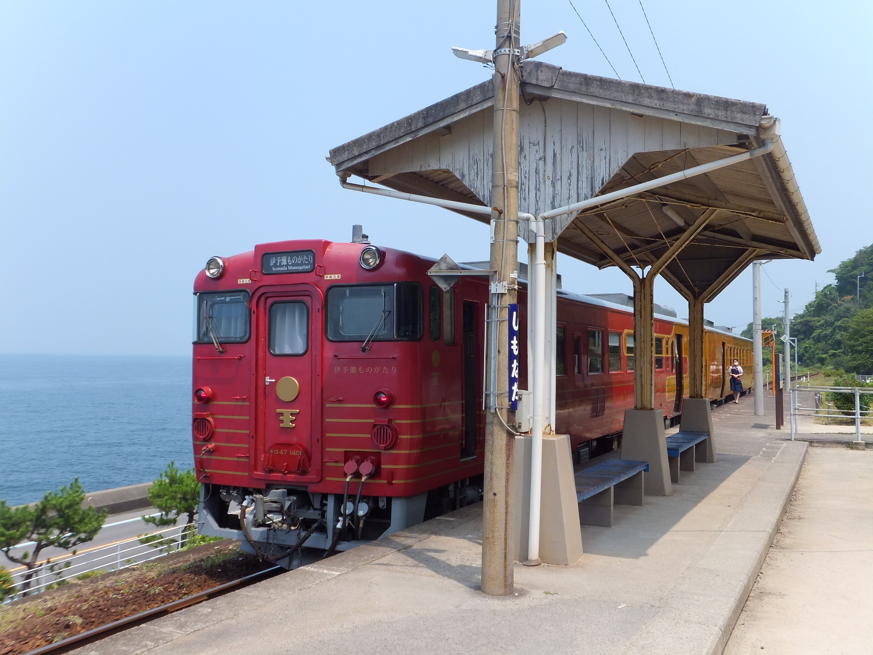 JR四国 伊予灘ものがたり 愛媛県伊予市双海町 2020年8月